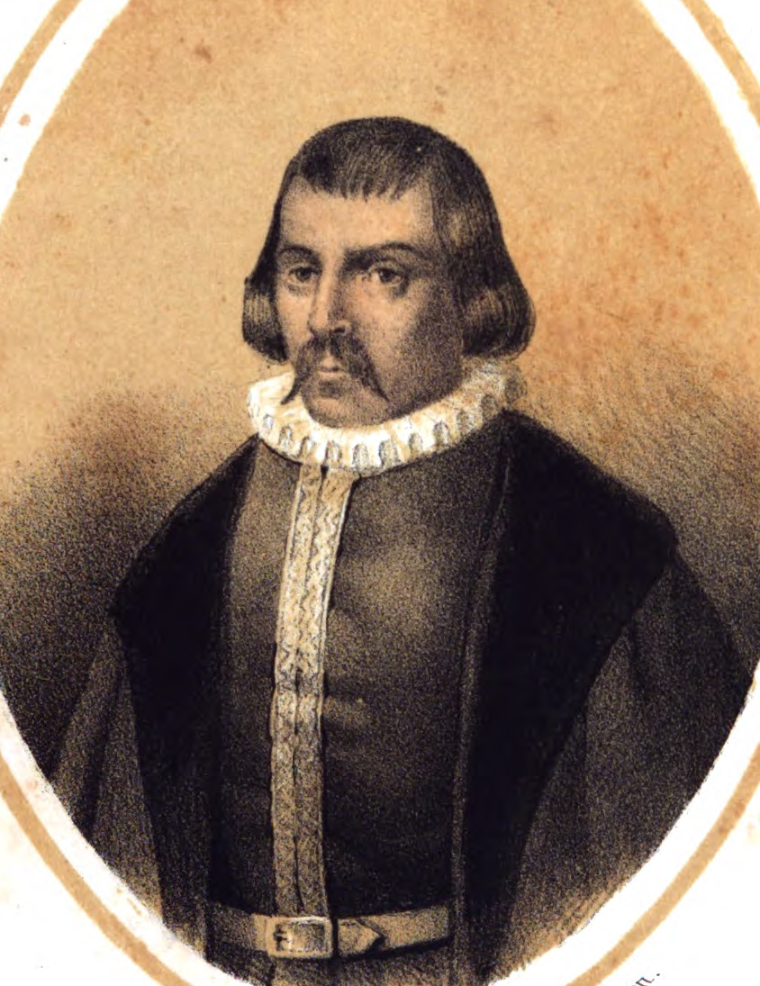 Juan Bravo.